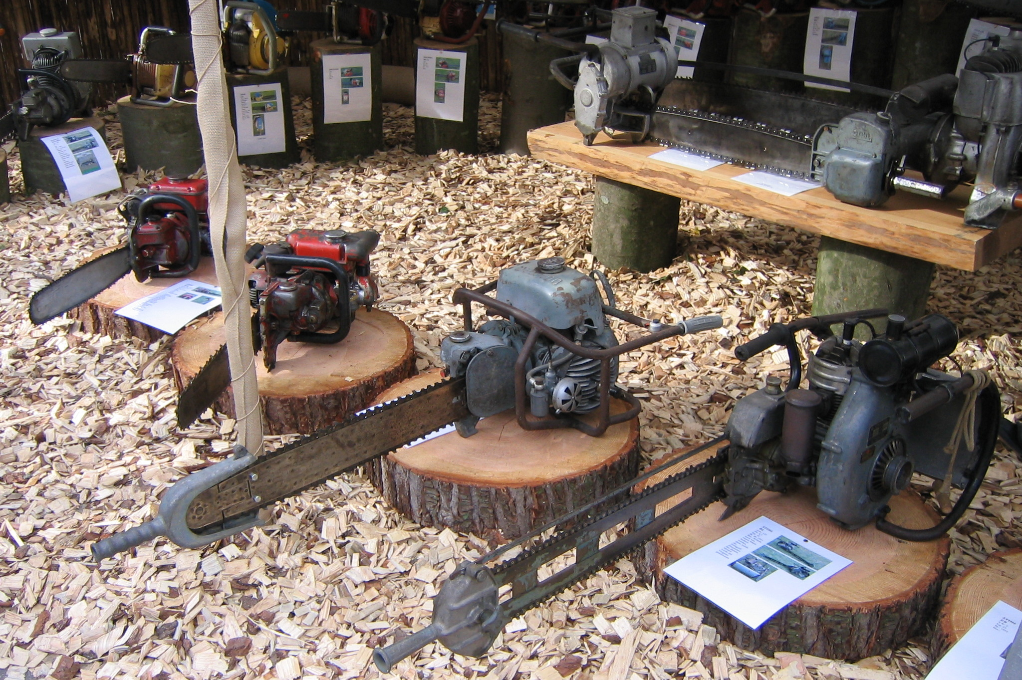 Chainsaws auf dem Festival Staufen Stages am Stand der Klaus Bärmann GmbH